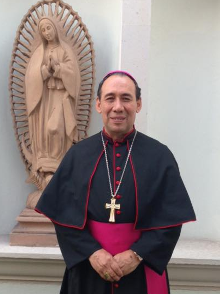 Arzobispo de Durango